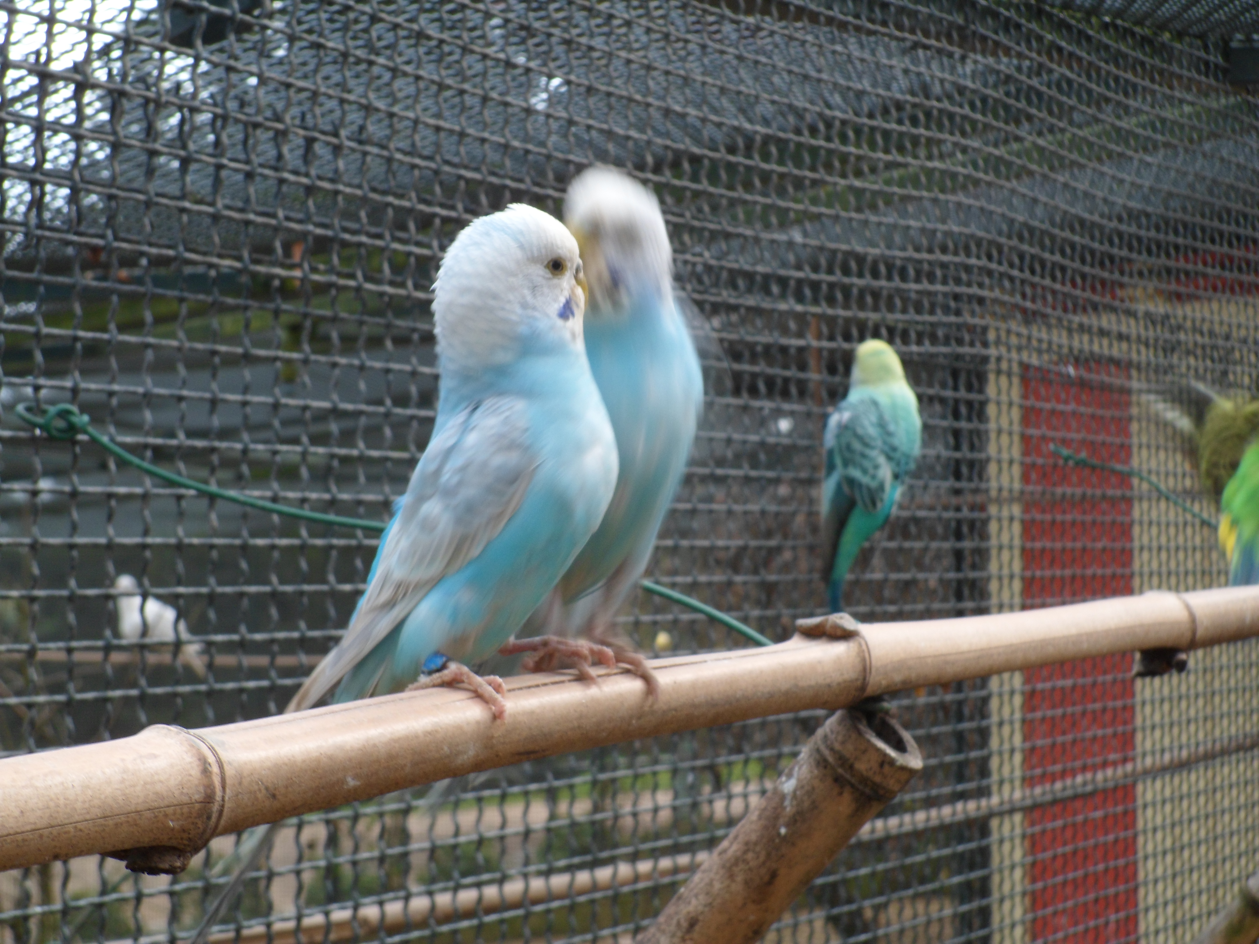 Parc du Thabor